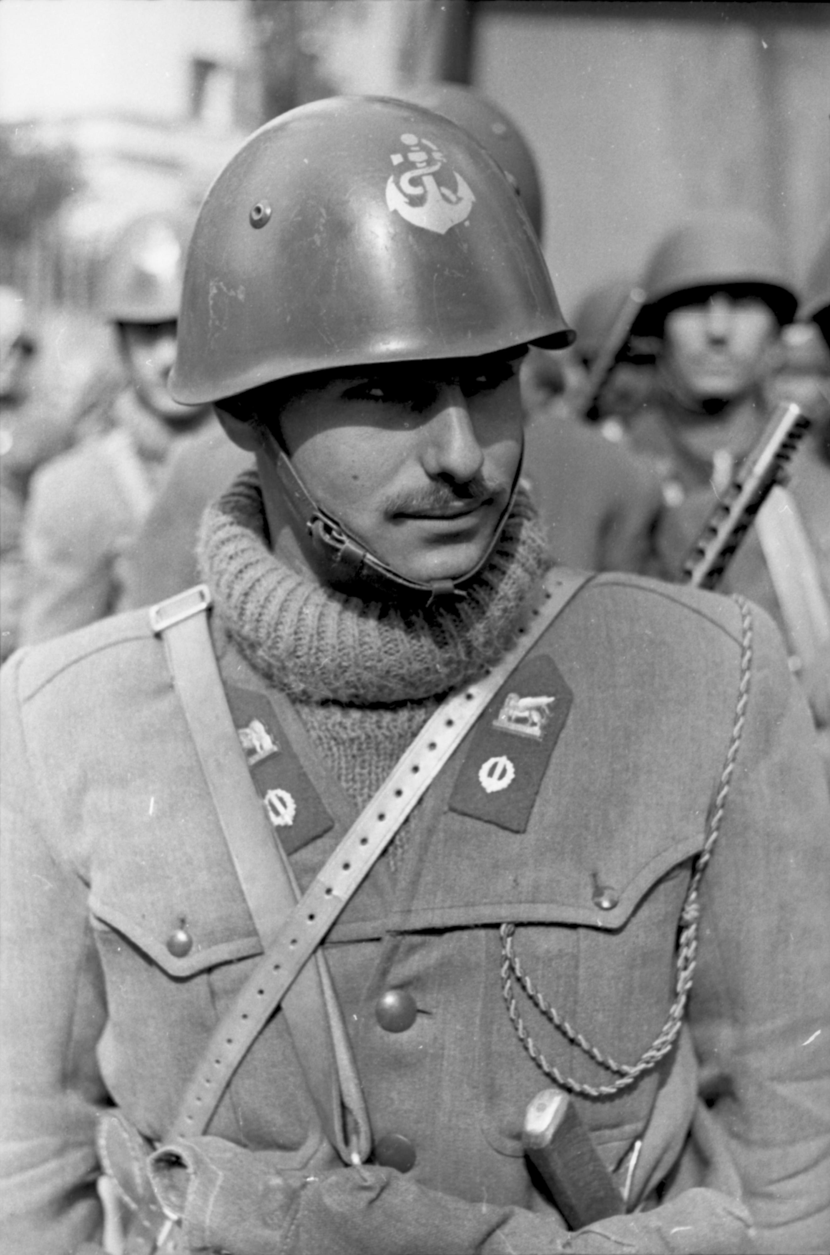 Roma, Italia, marzo 1944. Guardiamarina (Aspirante?) del 3° reggimento di fanteria di marina San Marco (Repubblica Sociale Italiana), schierato in viale Carso, presso piazza Bainsizza, rione Prati, durante una ispezione condotta dal generale della Luftwaffe Kurt Mälzer in occasione del dispiegamento del suo reparto sul fronte della testa di ponte alleata ad Anzio - Nettuno a sud di Roma. Information added by Wikimedia users.Rome, Italy, March 1944. Sub-lieutenant (Ensign?) of 3th regiment San Marco (belonging to the RSI Navy, and fighting as allied of the Germans) standing in viale Carso near piazza Bainsizza (Prati district, see here), inspected by General der Luftwaffe Kurt Mälzer (see here) around the time this unit was deployed to counter the Allied beachhead at Anzio - Nettuno, south of Rome. The very same officer is pictured at File:Bundesarchiv Bild 101I-311-0926-06, Italien, italienische Soldaten.jpg. See also: File:Bundesarchiv_Bild_101I-311-0926-08,_Italien,_italienische_Soldaten,_deutscher_General.jpg and File:Bundesarchiv Bild 101I-311-0926-09, Italien, italienische Soldaten, deutscher General.jpg.